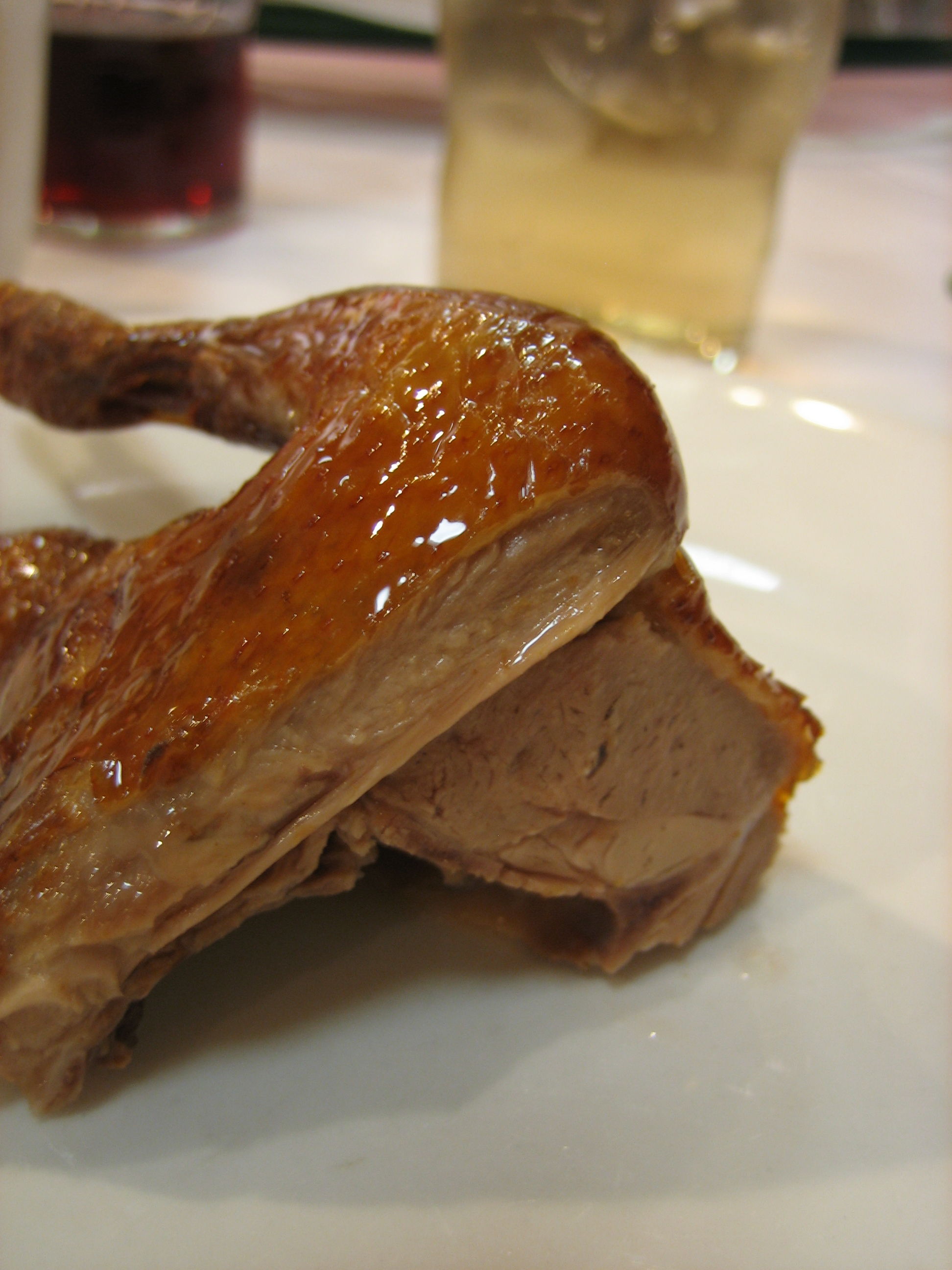 Squab at a Chinese restaurant